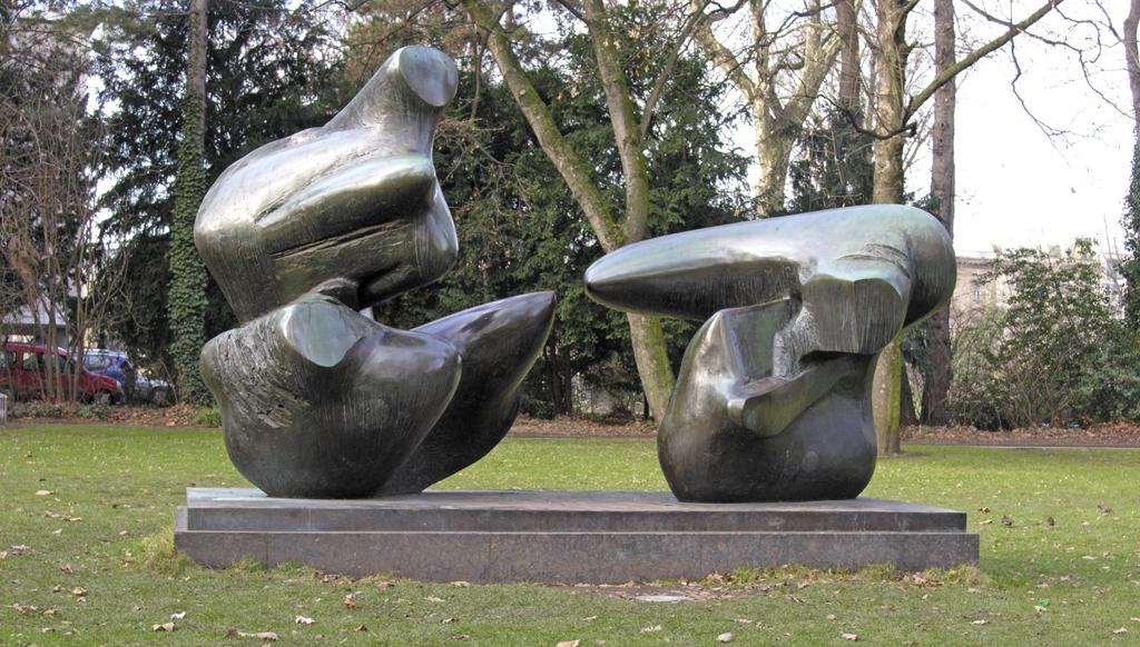 Henry Moore, "Two-Piece Reclining Figure: Points", 1969–1979, Deutschland, Nordrhein-Westfalen, Düsseldorf, Hofgarten